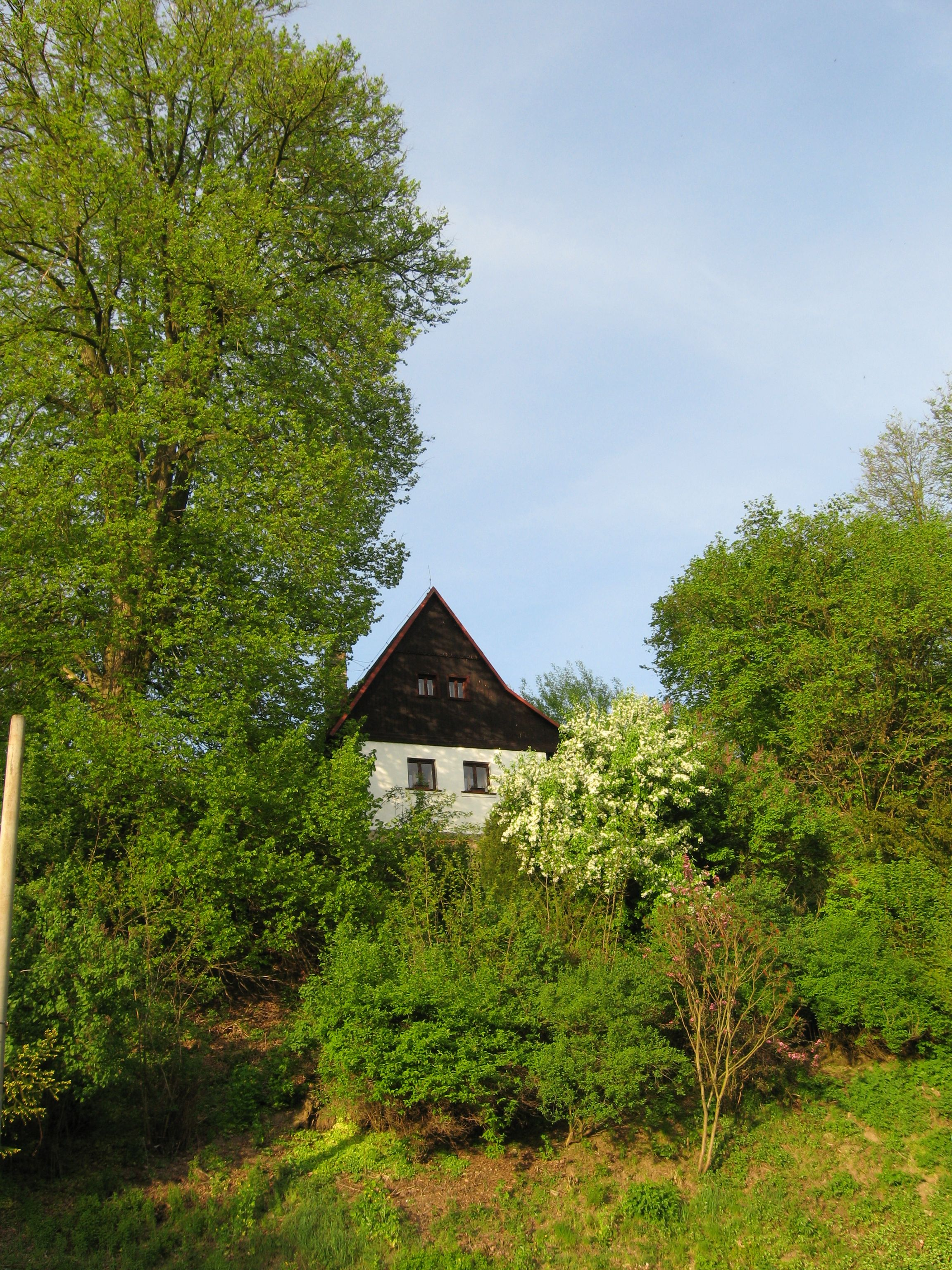 Památná lípa ve středu obce nad vodní nádrží rostoucí u chalupy č. 10